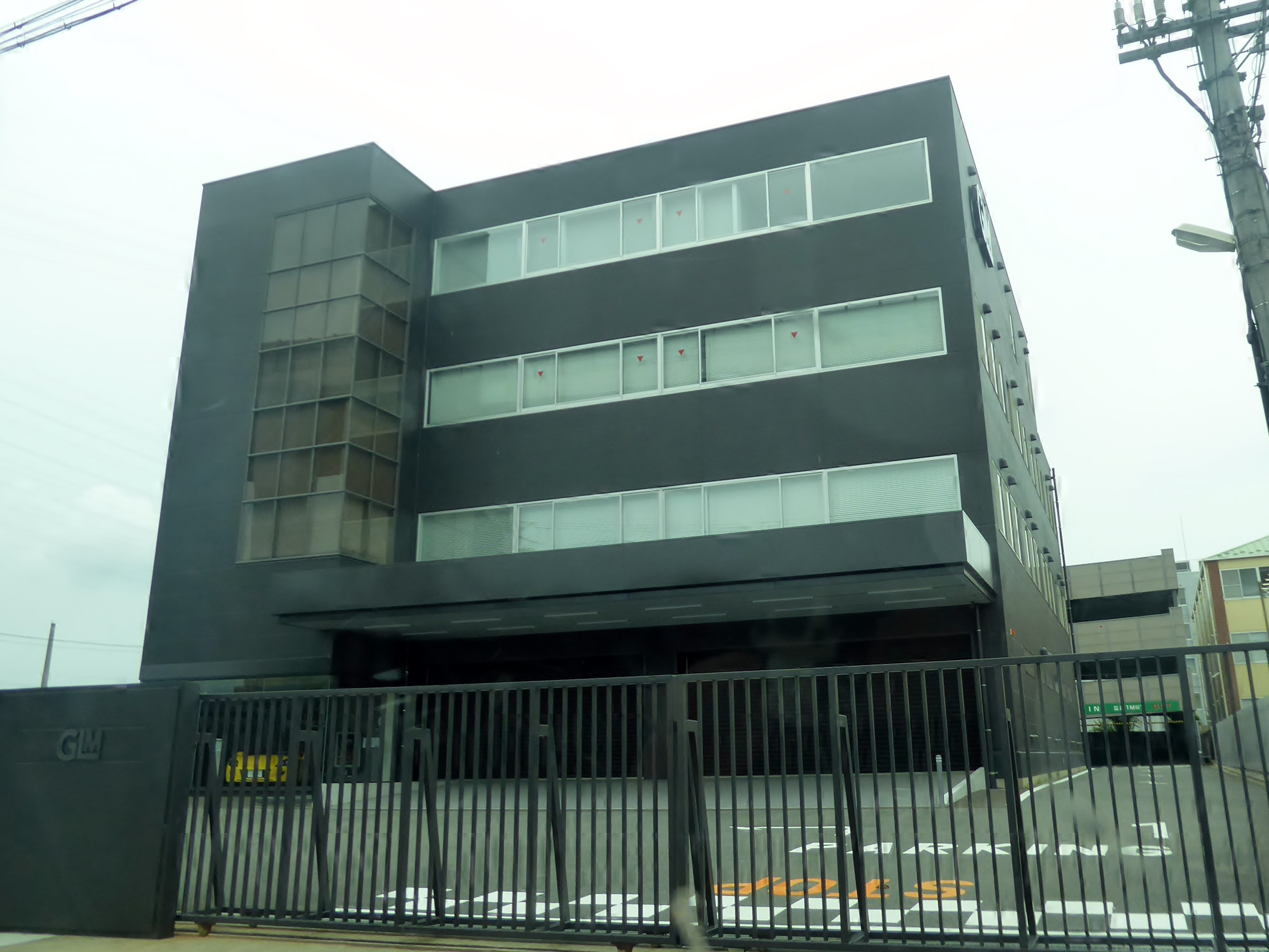 GLM株式会社本社を撮影。